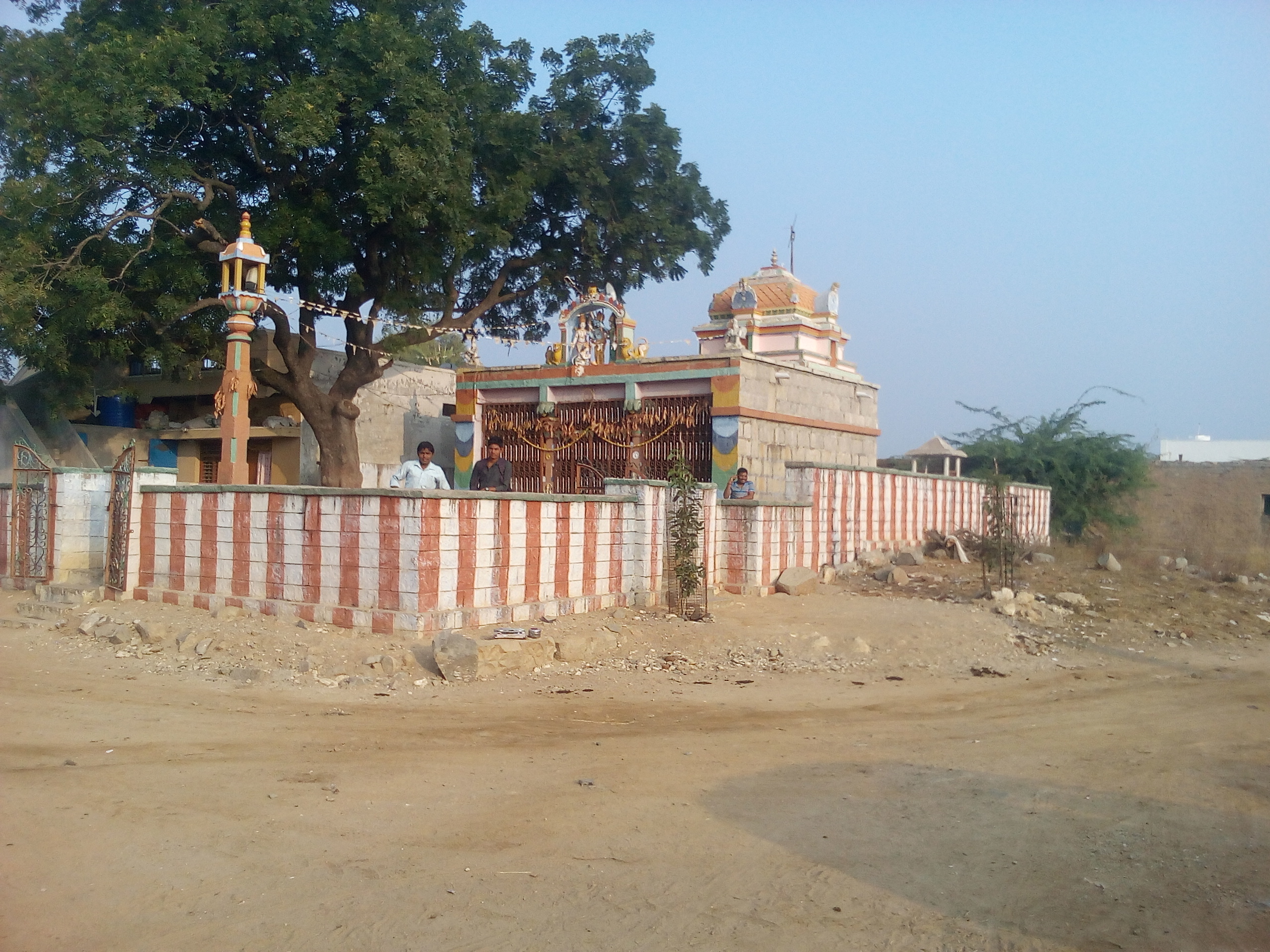 శ్రీఆంజనేయస్వామి దేవాలయం, గోపాల్‌దిన్నె